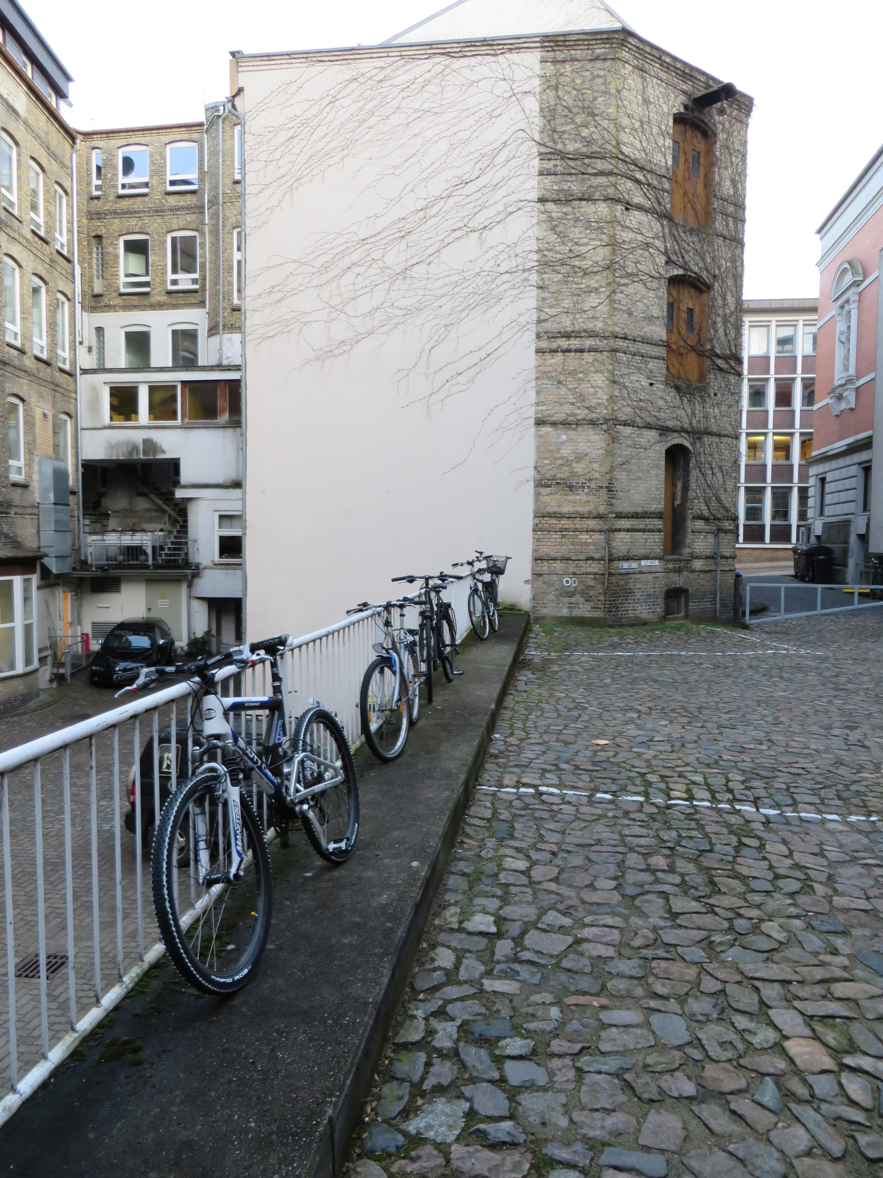 Rest-Thingplatz (Flensburg), Bild 01